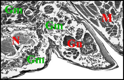 Emplacement de la glande de mue dans le prosoma de Poecilopachys australasia